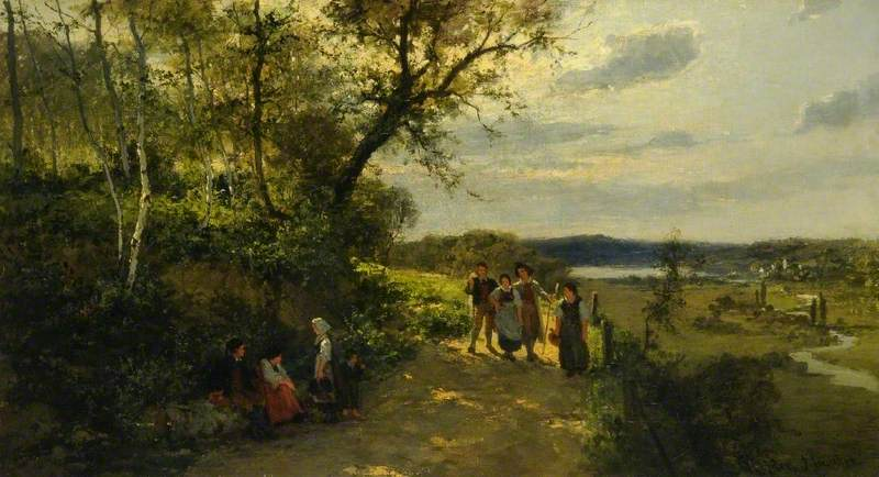 Landschaftsbild mit Gestalten (Museum Sheffield)